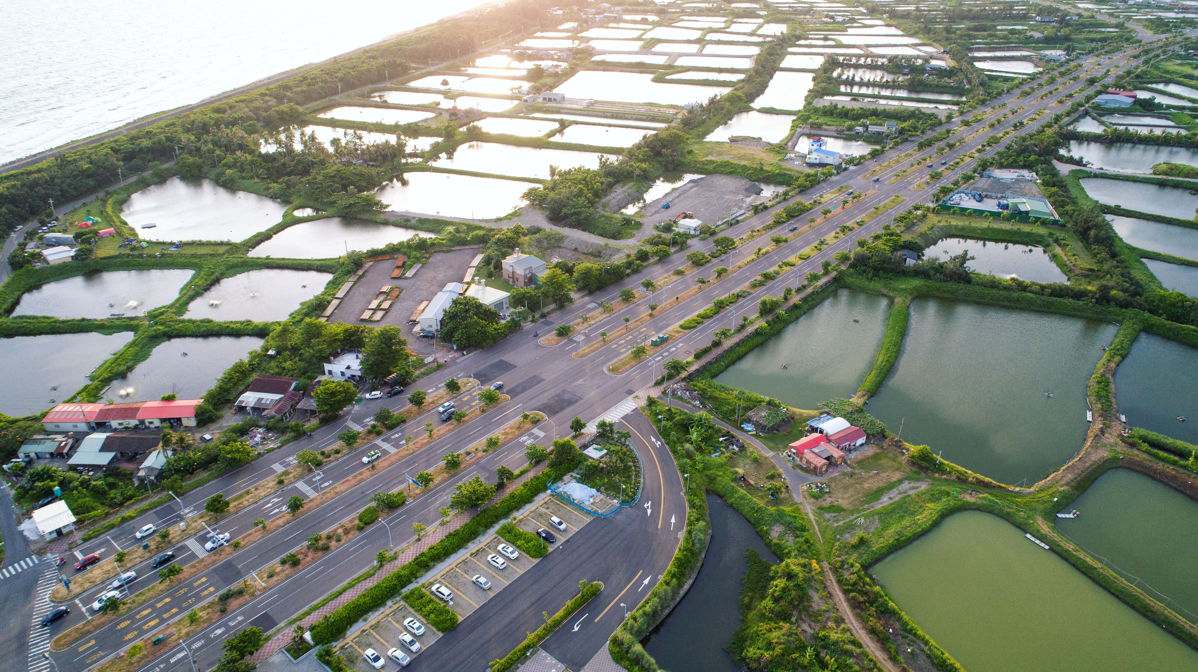 中文（台灣）: 四草大道 ( 二 )